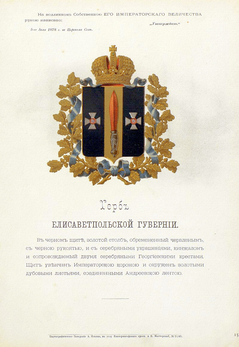 Official Russian Empire coat of arms Elisavetpol Gubernia. Герб Российской Империи Елисаветпольской губернии с официальным описанием в Гербовнике Бенке. Утверждён Императором Всероссийским Александром Вторым.